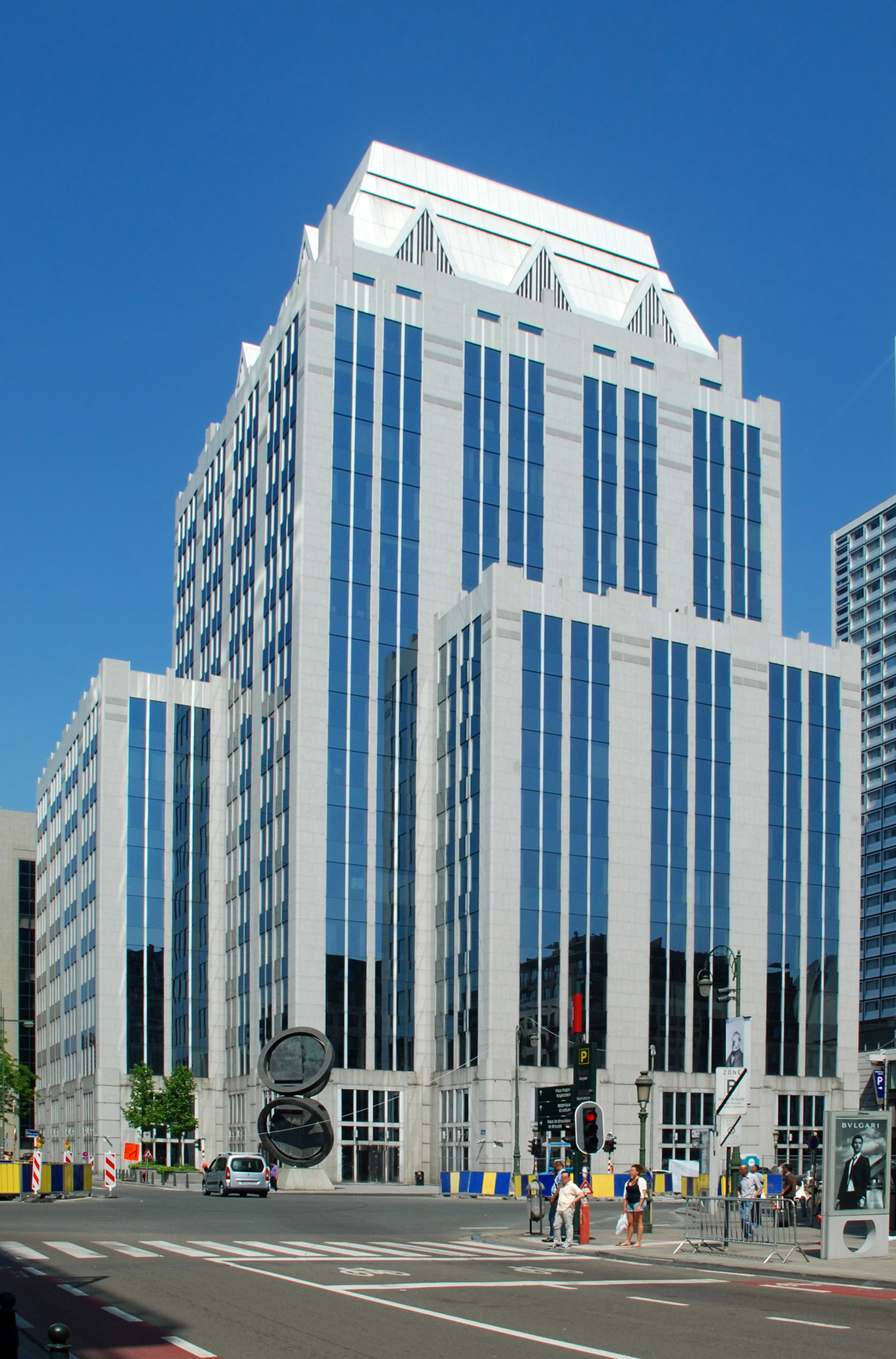 Belgique - Bruxelles - Tour Baudouin - Siège d'Euroclear (Architecture postmoderne en Belgique - Atelier de Genval - 1989)